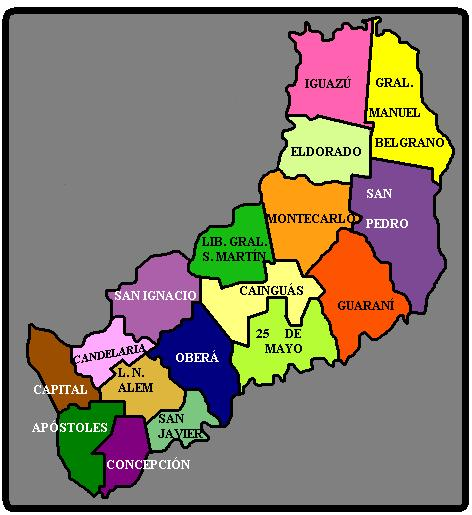 Autor: Loco085 15:03, 11 Jun 2005 (UTC)